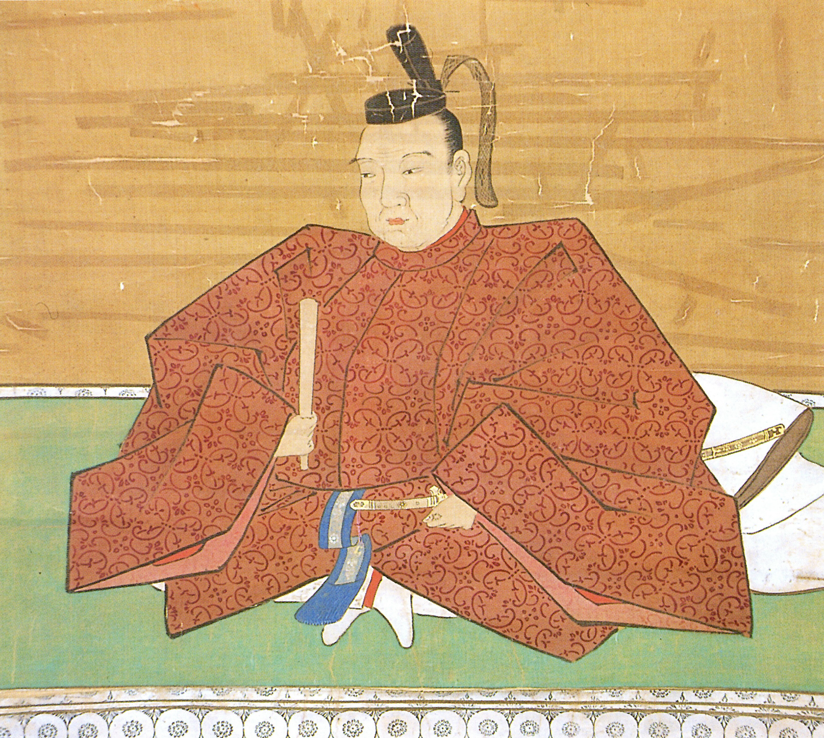 細川行孝の肖像。